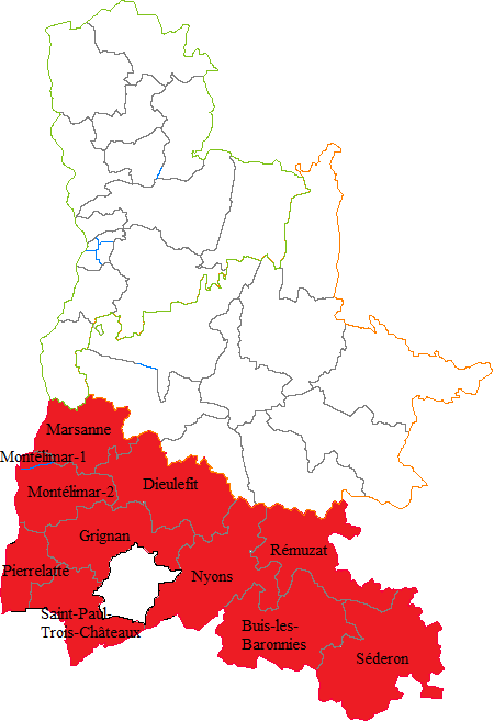 Carte de l'arrondissement de Nyons dans la Drôme